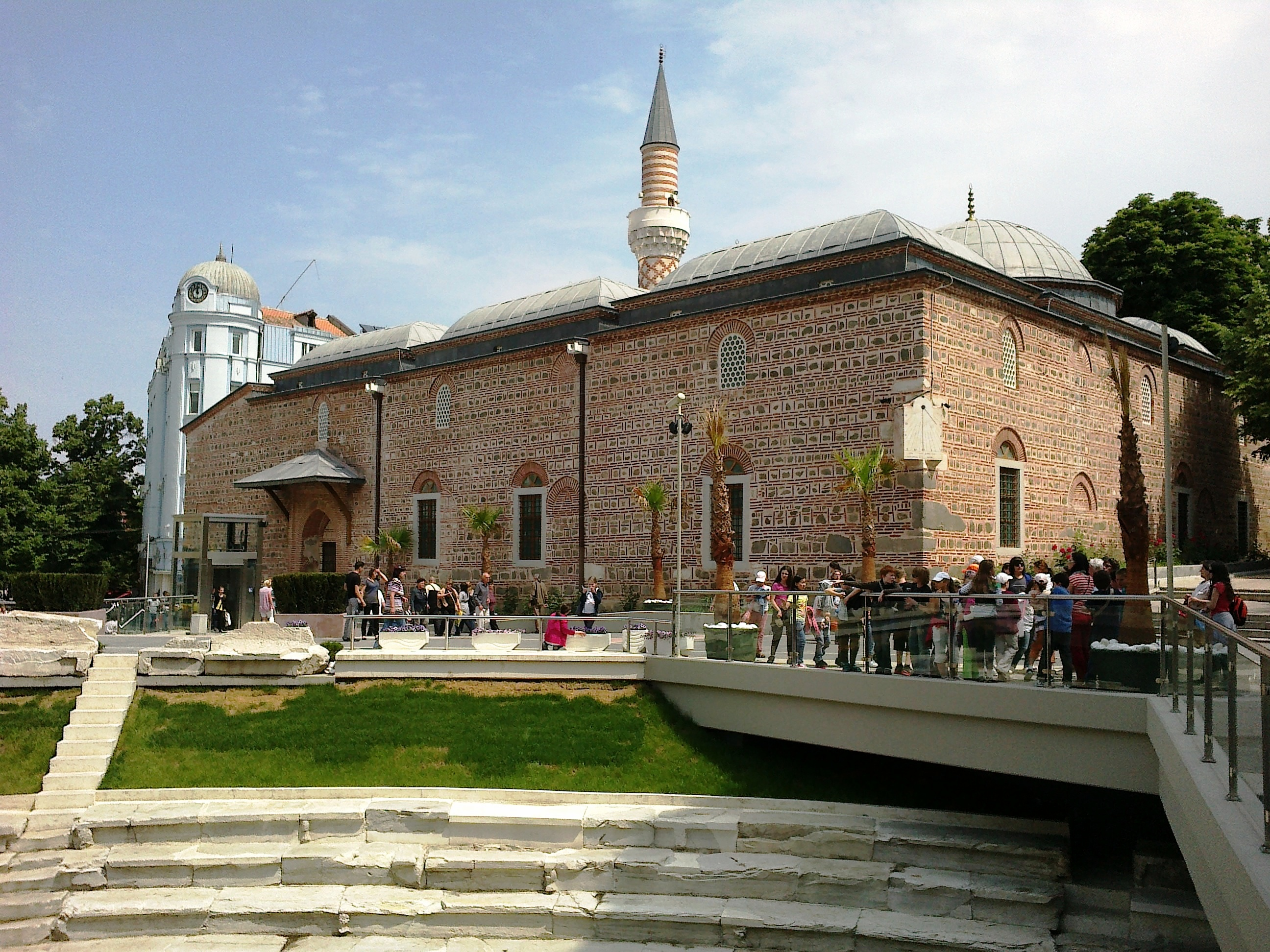 Джумая джамия и Античния стадион на Филипопол (долу). Поглед от Главната улица на Пловдив.